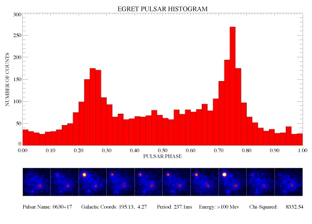 Anni '90 - La pulsazione X e gamma